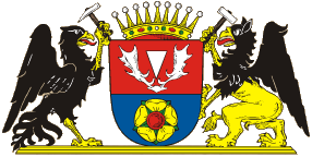 Znak městysu Mrákotín, okres Jihlava.